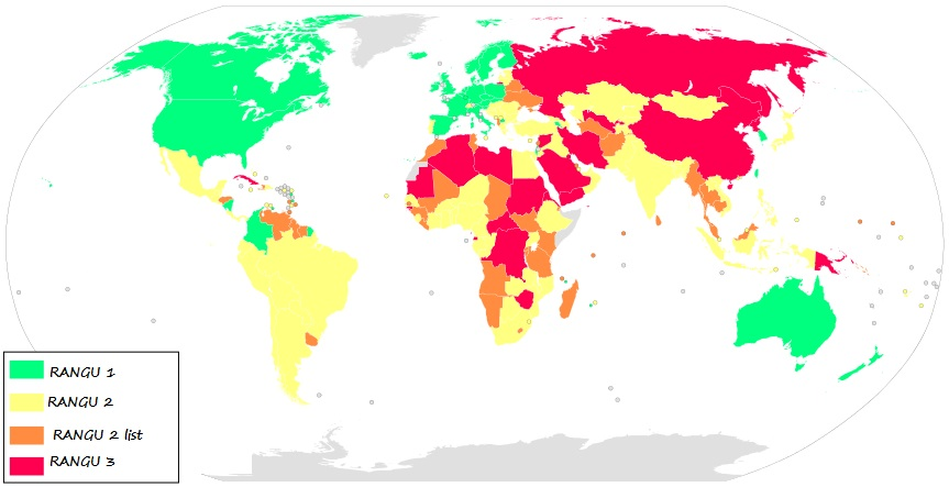 Raporti në hartë bazuar në të dhënat e vitit 2013